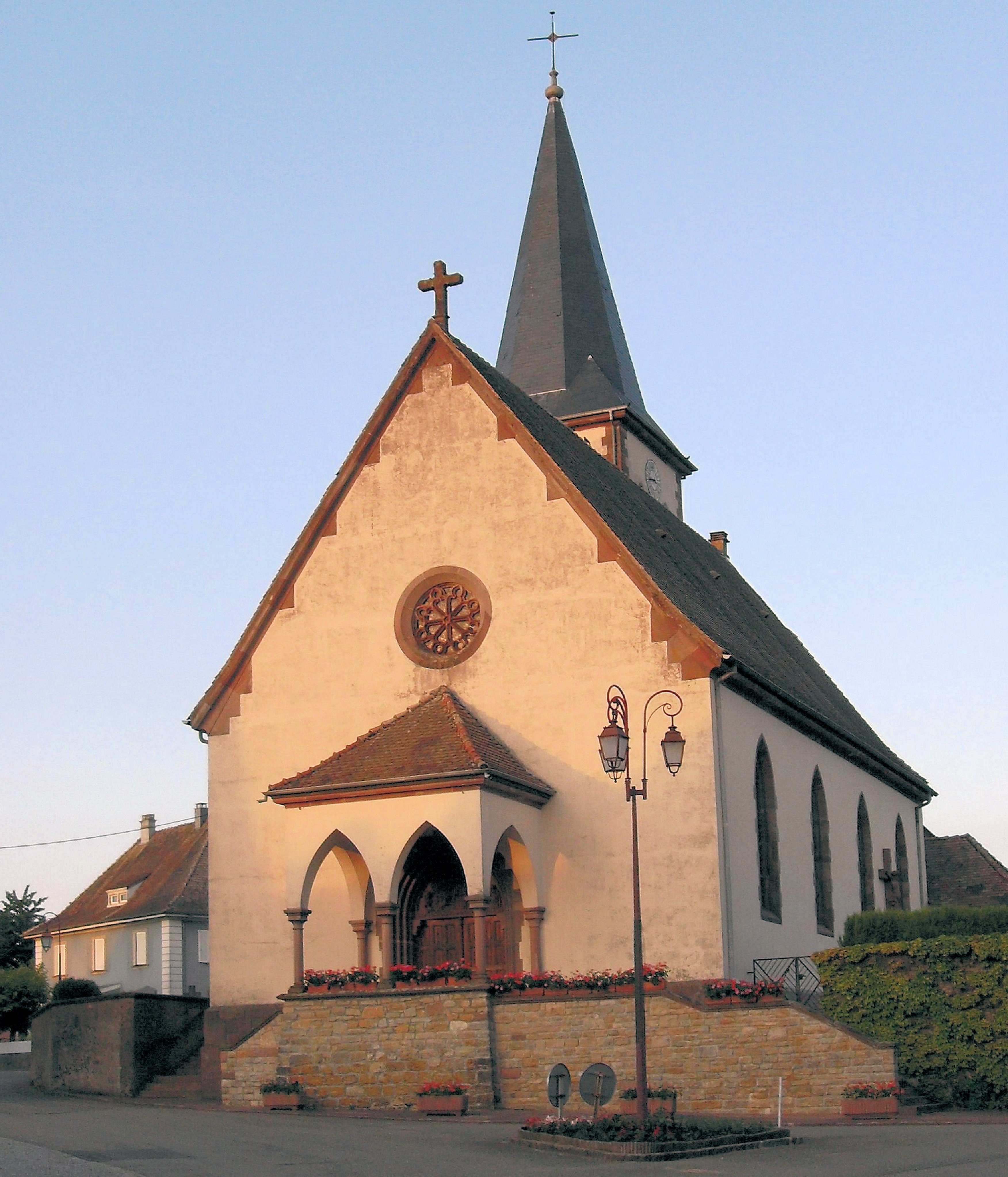 L'église Saint-Étienne d'Ammerzwiller